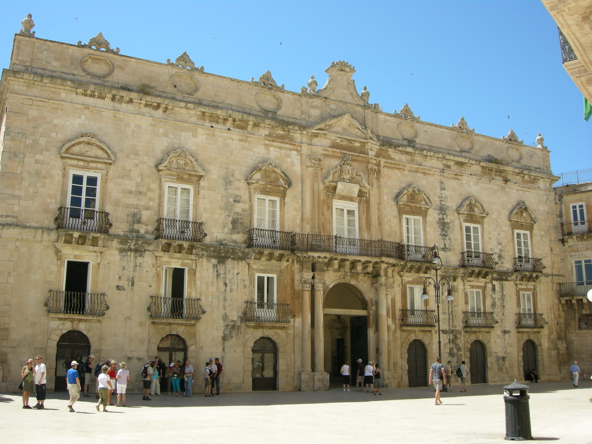 Ortigia, palazzo beneventano del bosco